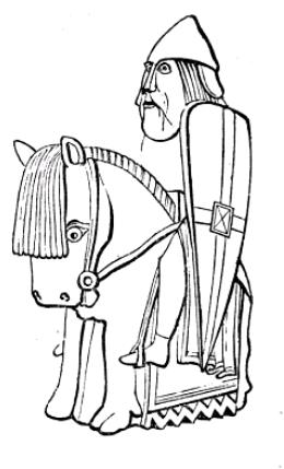 Desenho do Cavalo no conjunto de peças de Lewis